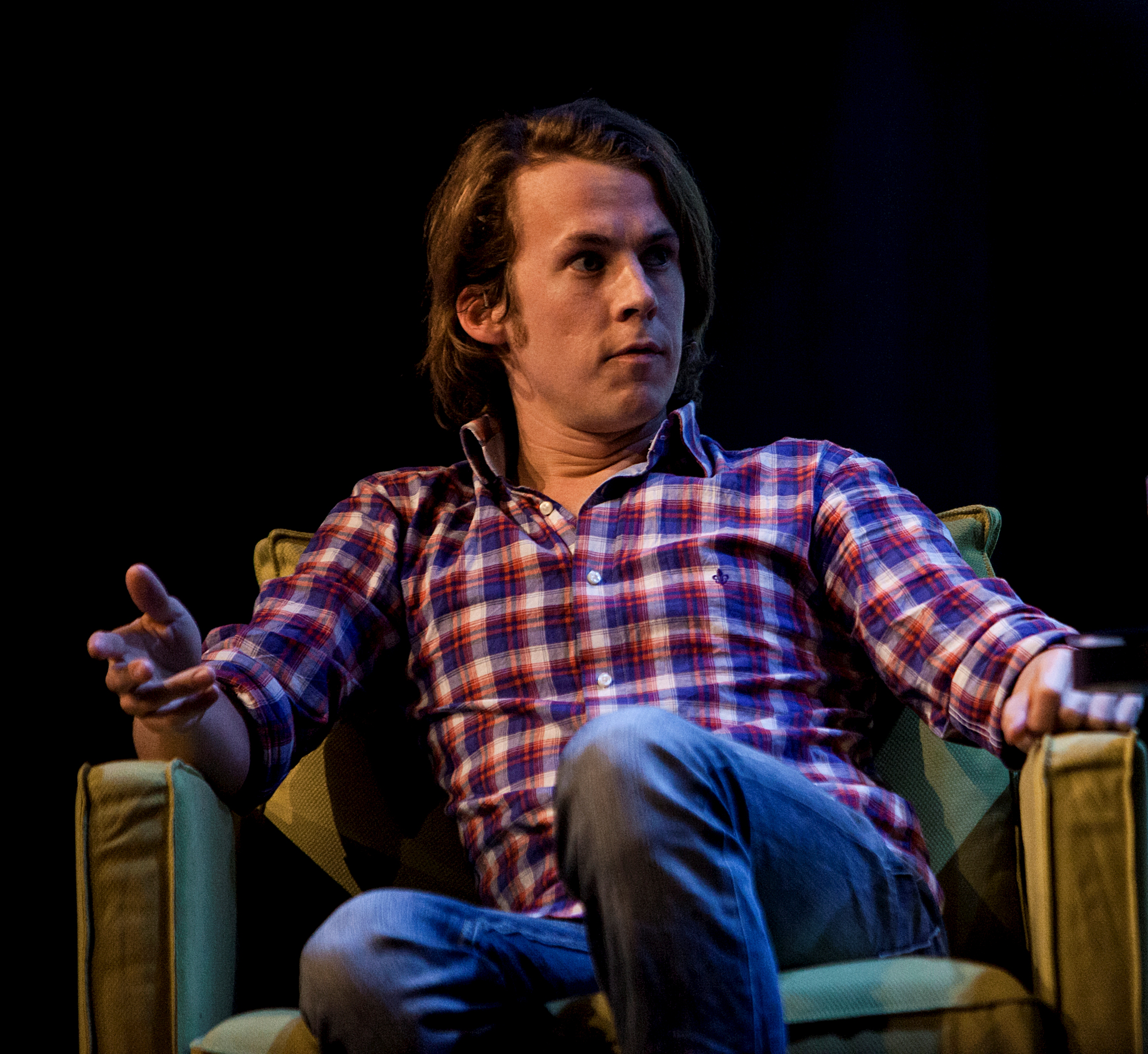 Bård Ylvisåker på Nordiske mediedager i Bergen